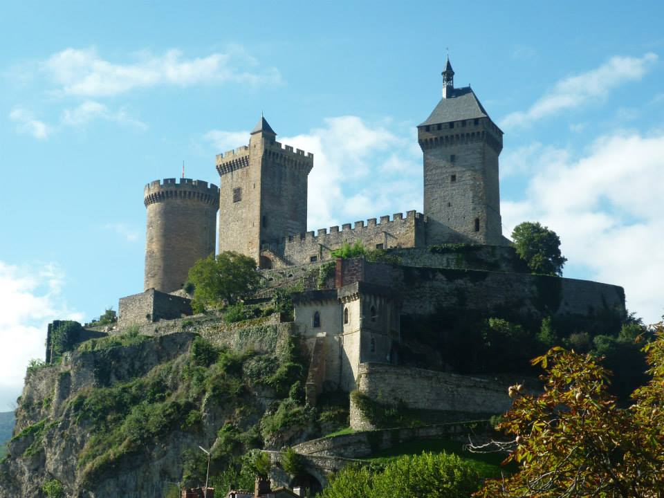 château de Foix, Ariège, Pyrénées, vue nord-est, depuis la préfecture